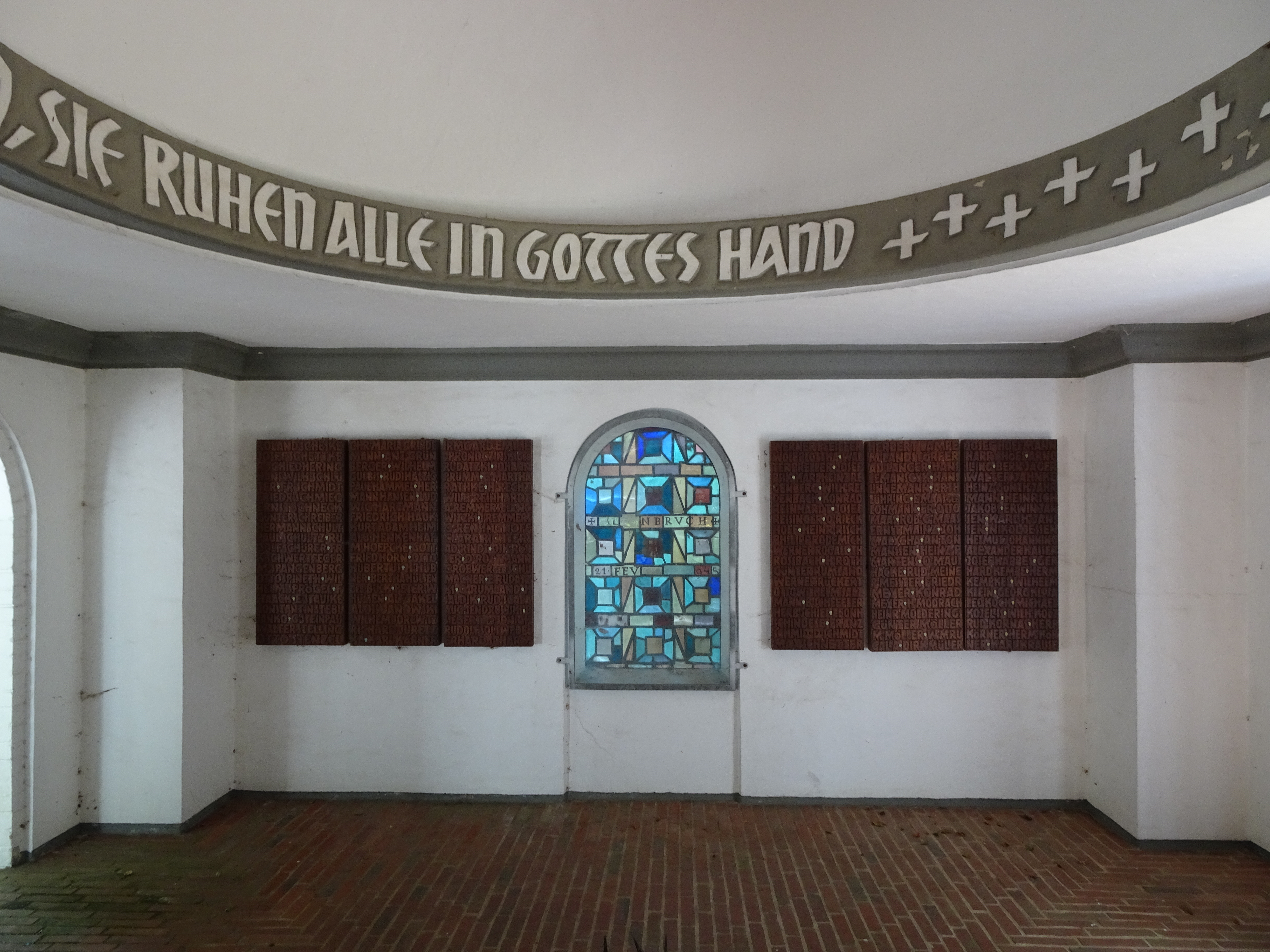 Friedhof Brockeswalde in Cuxhaven